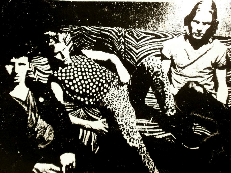 Marionetz1981 im Studio Early Ledder, Sigi Pop, Günther B